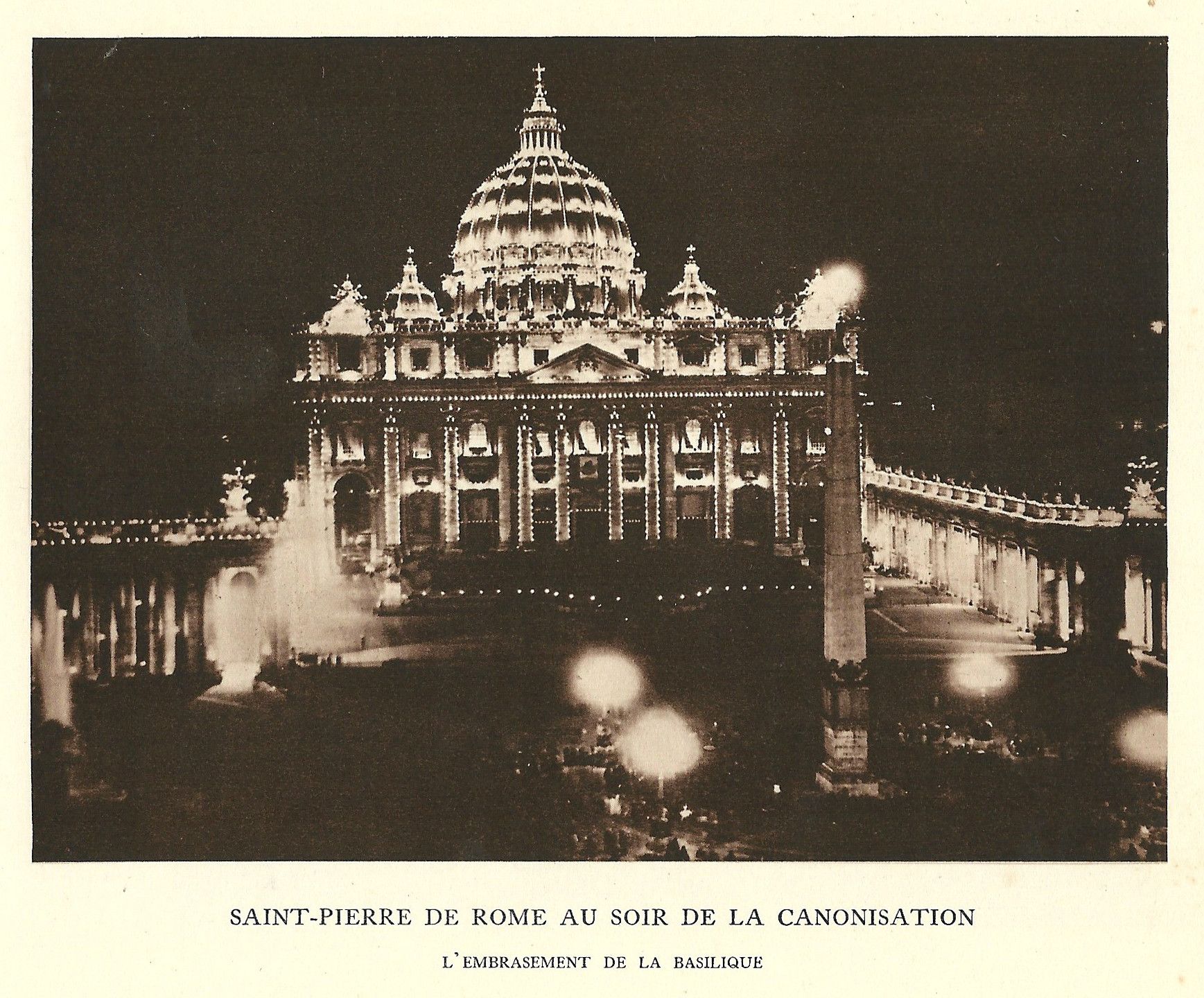 Gravure de "Sainte Thérèse de l'Enfant Jésus, Histoire d'une âme écrite par elle-même, Lisieux, Office central de Lisieux (Calvados), & Bar-le-Duc, Imprimerie Saint-Paul, 1937, édition 1940."